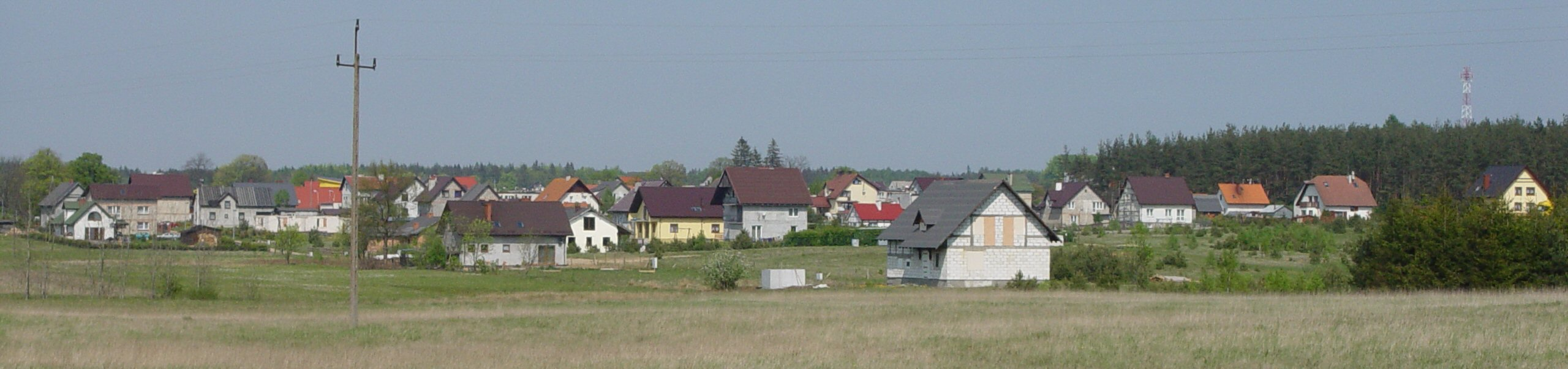 Leśniewo (kaszb. Lésniéwò) – duża wieś kaszubska w Polsce położona w województwie pomorskim, w powiecie puckim, w gminie Puck na obszarze Puszczy Darżlubskiej.